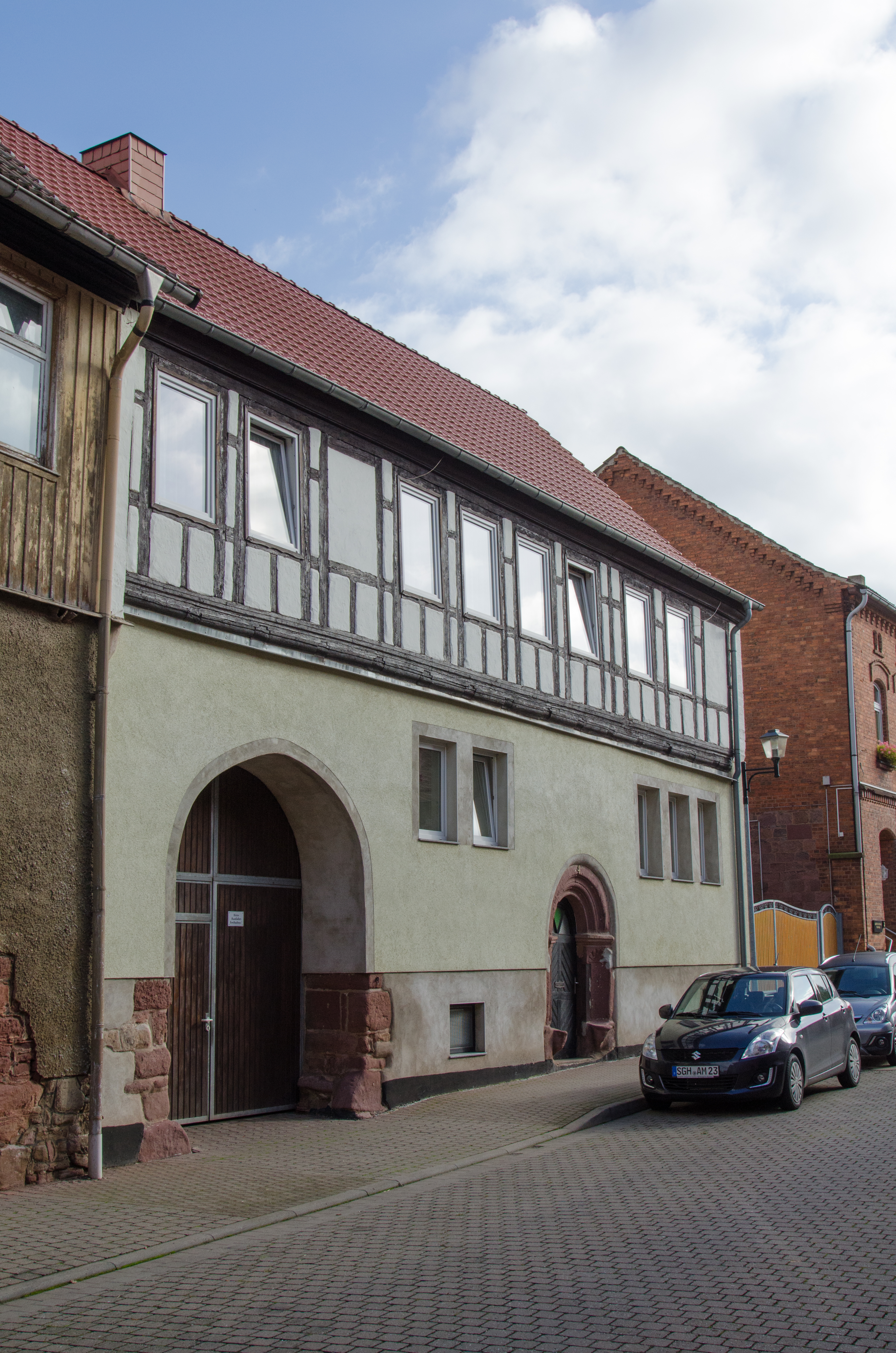 Kelbra, Bornstraße 4